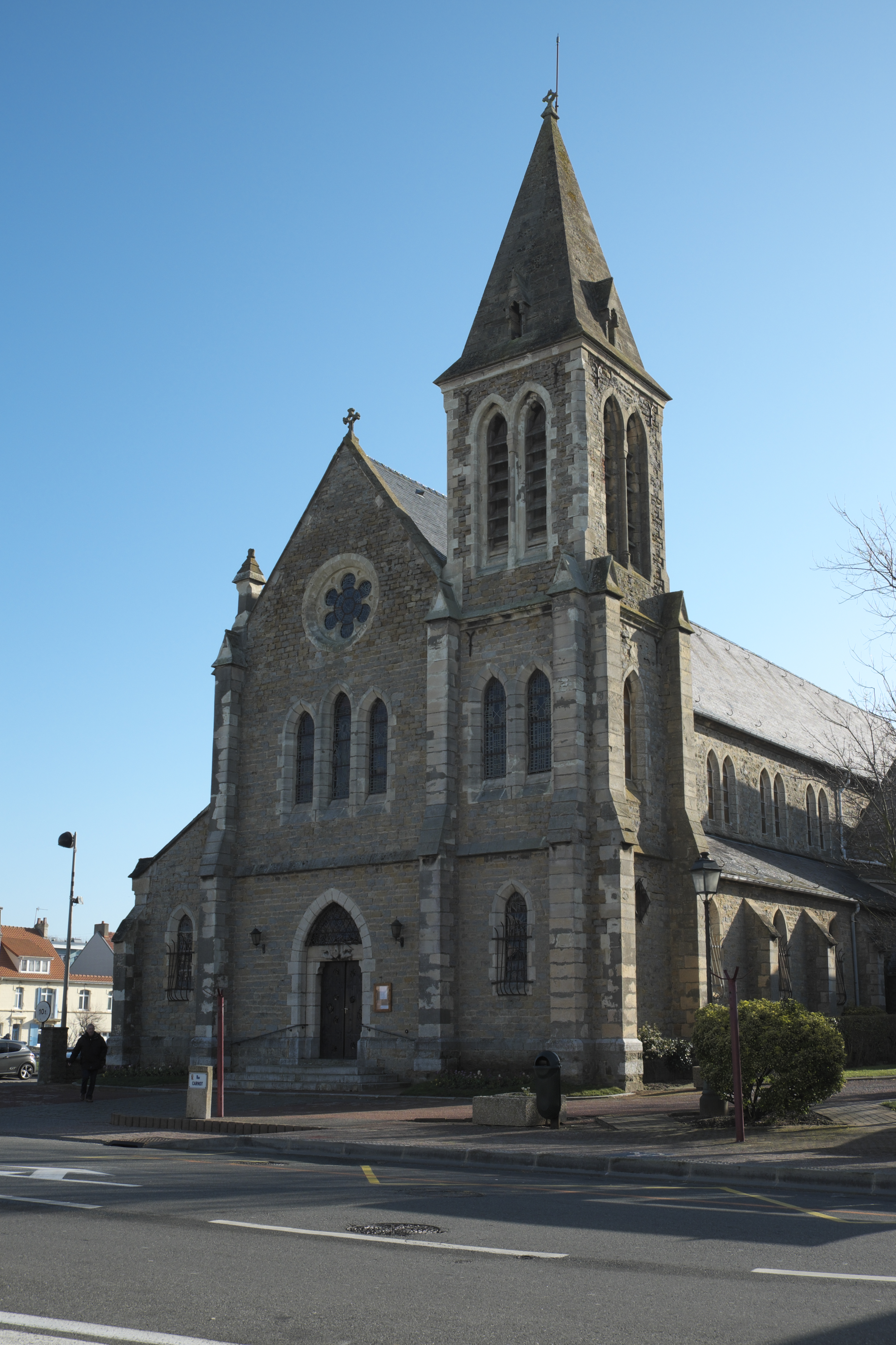 Katholische Kirche Immaculée-Conception in Wimereux im Département Pas-de-Calais (Hauts-de-France/Frankreich)